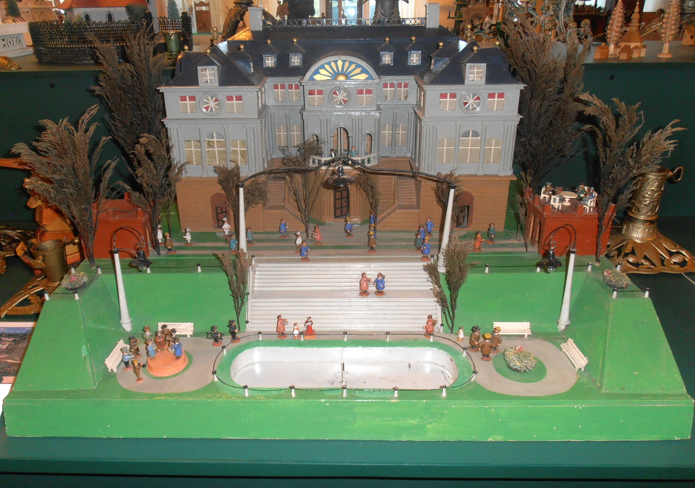 Modell des Palais im Großen Garten Seiffen/Erzgebirge, Fam. Ehnert um 1935/40